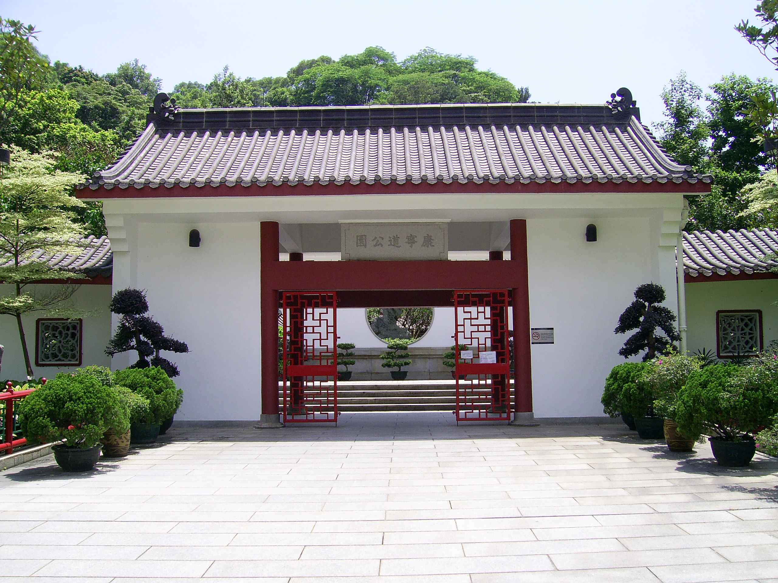 中文（香港）: 康寧道公園